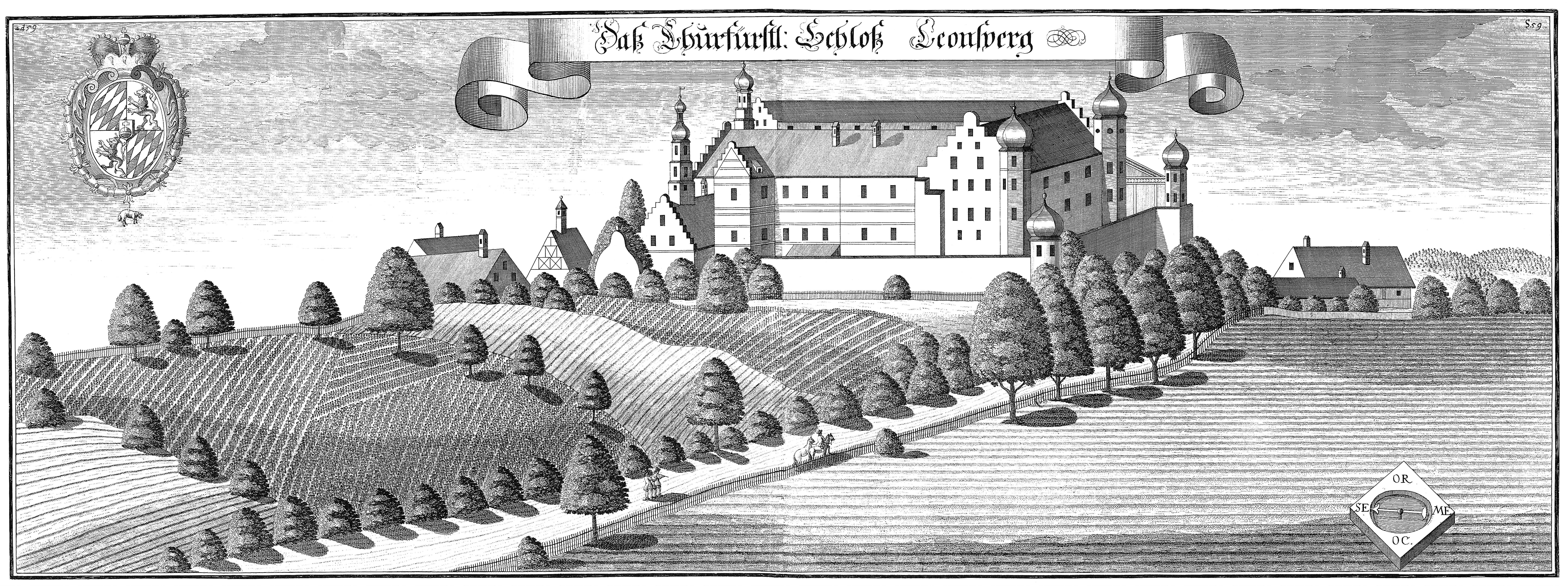 Schloß Leonsberg, Gemeinde Pilsting. Kupferstich von Michael Wening